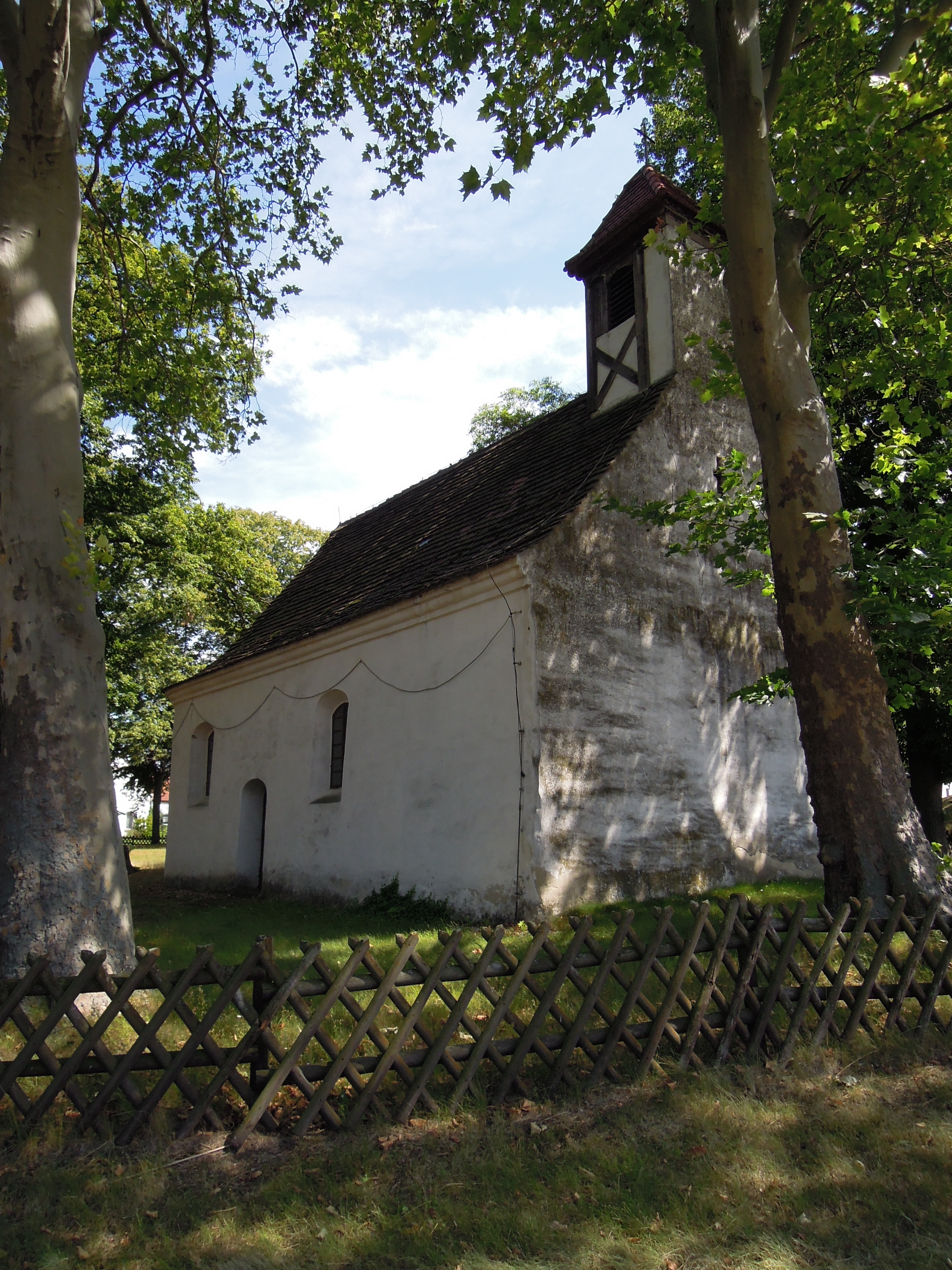 Kirche Österitz -Westansicht- im August 2020